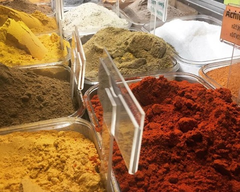 Condimentos en un tramo del Mercado Central de San José